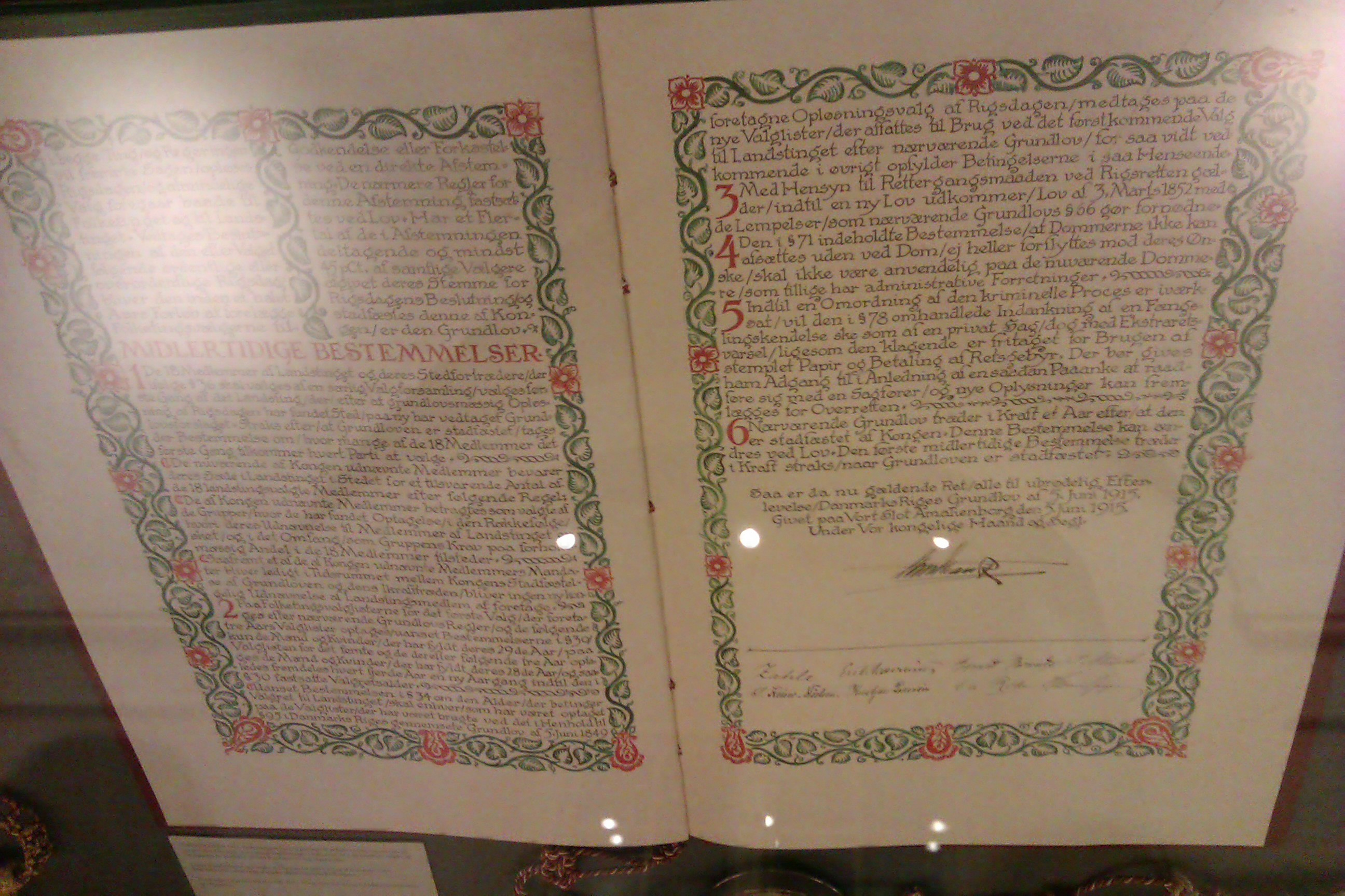 Fotografi af den kopi af Grunloven af 1915, der findes i Folketingets Vandrehal. Originalen findes i Rigsarkivet.